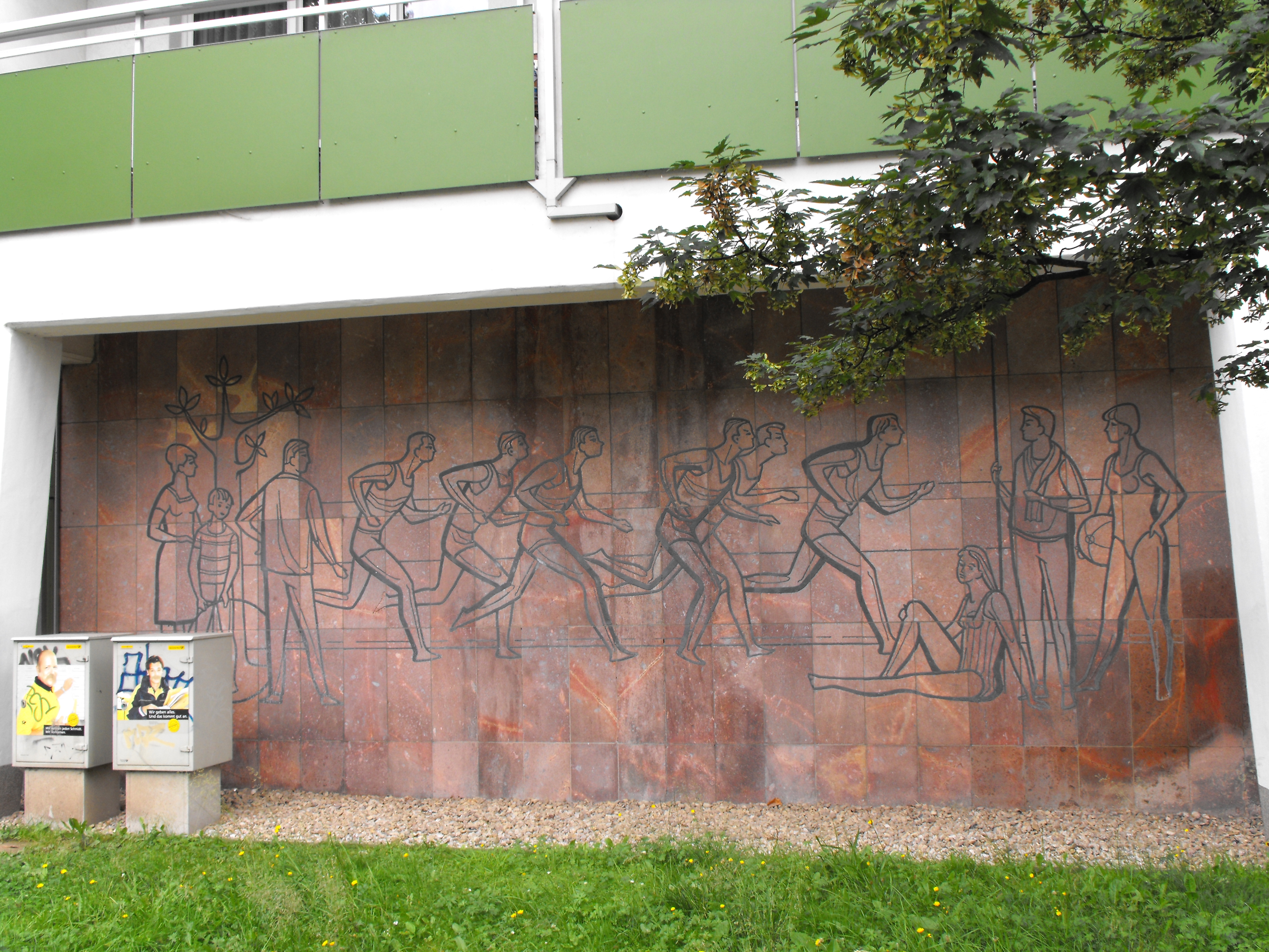 Bleiintarsien in der Chemnitzer Brückenstrasse in Zusammenarbeit von Johannes Belz, Robert Diedrichs, Rudolf Fleischer und Rudolf Kraus Entwurf: Rudolf Kraus